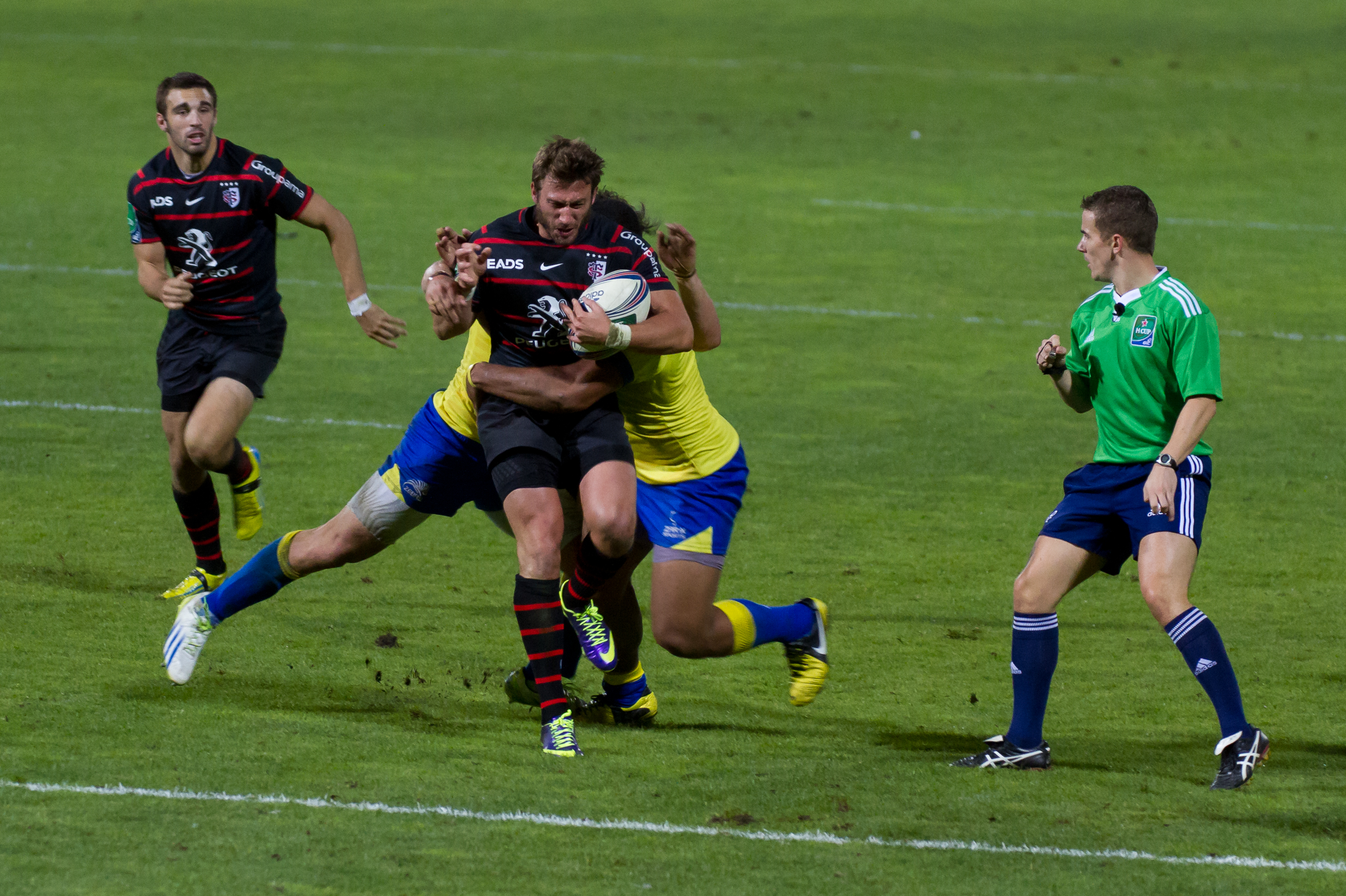 Heineken Cup 2013-14 — 11 October 2013, Stade Ernest-Wallon. Match between: Stade toulousain — Zebre